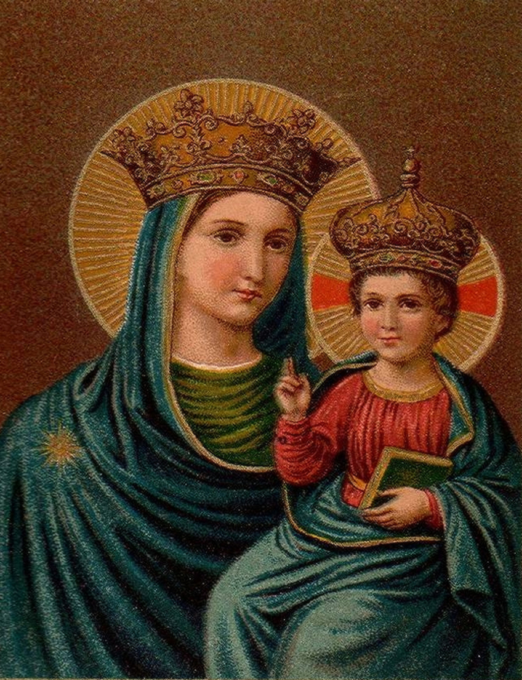 Madre de la Compañía de Jesús